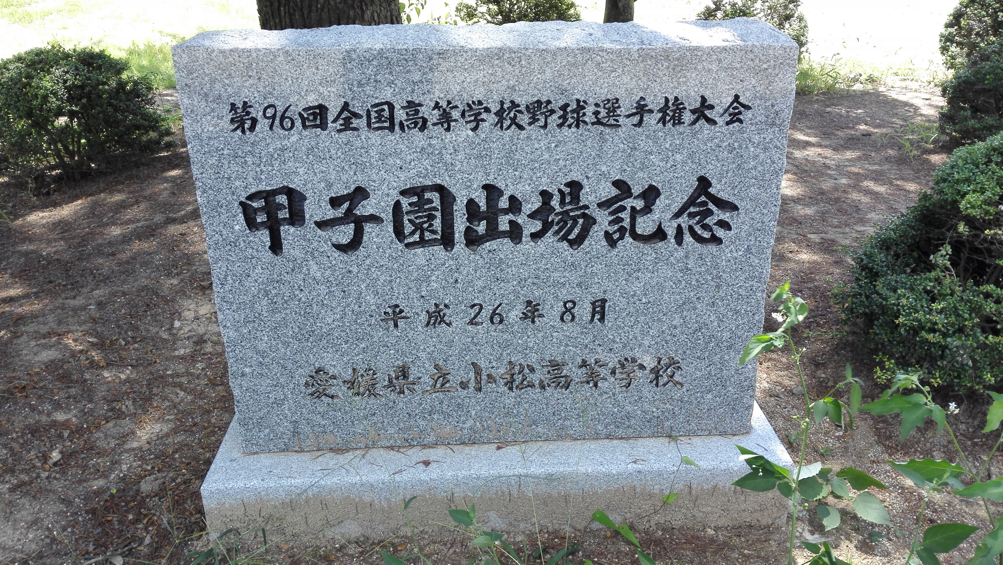 小松高校甲子園初出場記念碑